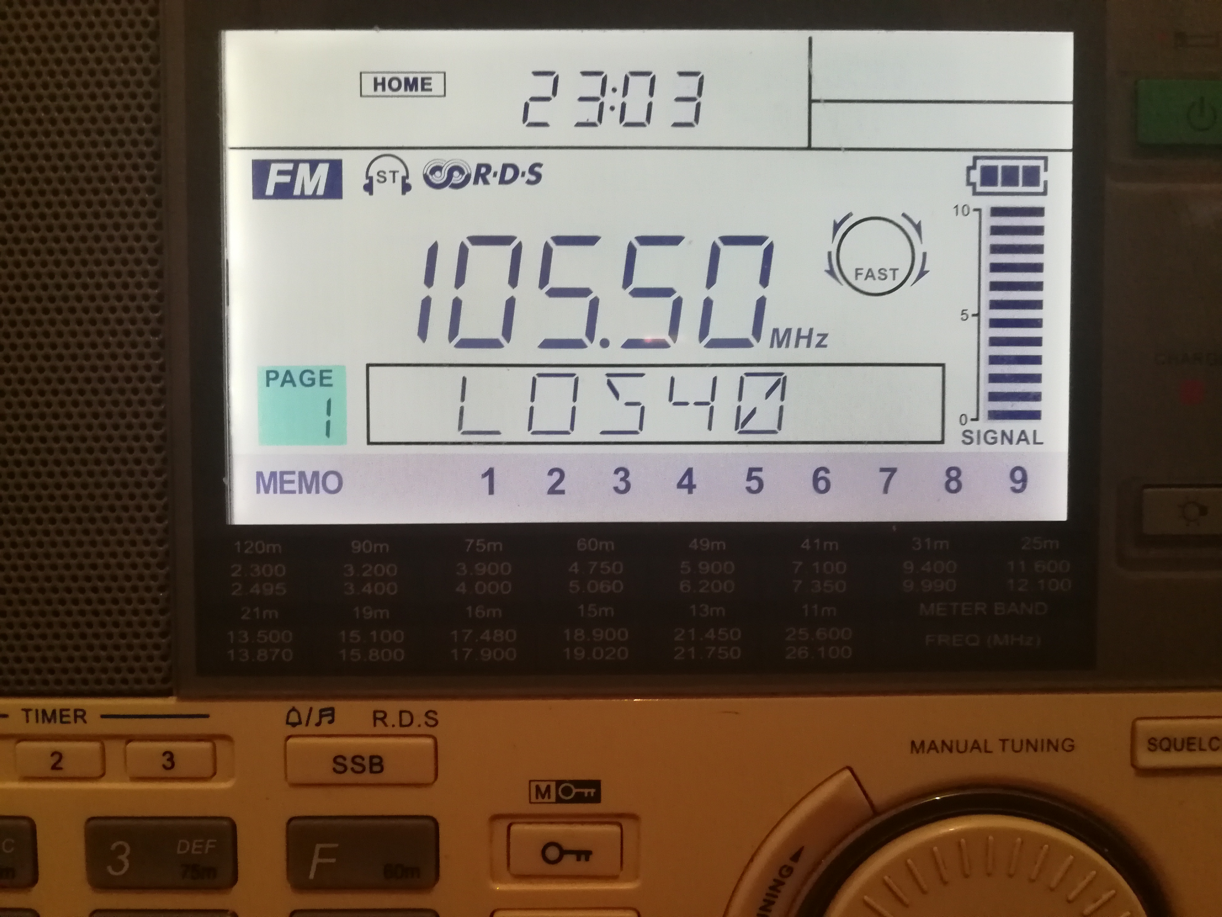 Sistema RDS funcionando en una Sangean ATS-909X sintonizando la radio Los 40 Principales de la ciudad de Buenos Aires, en Argentina.